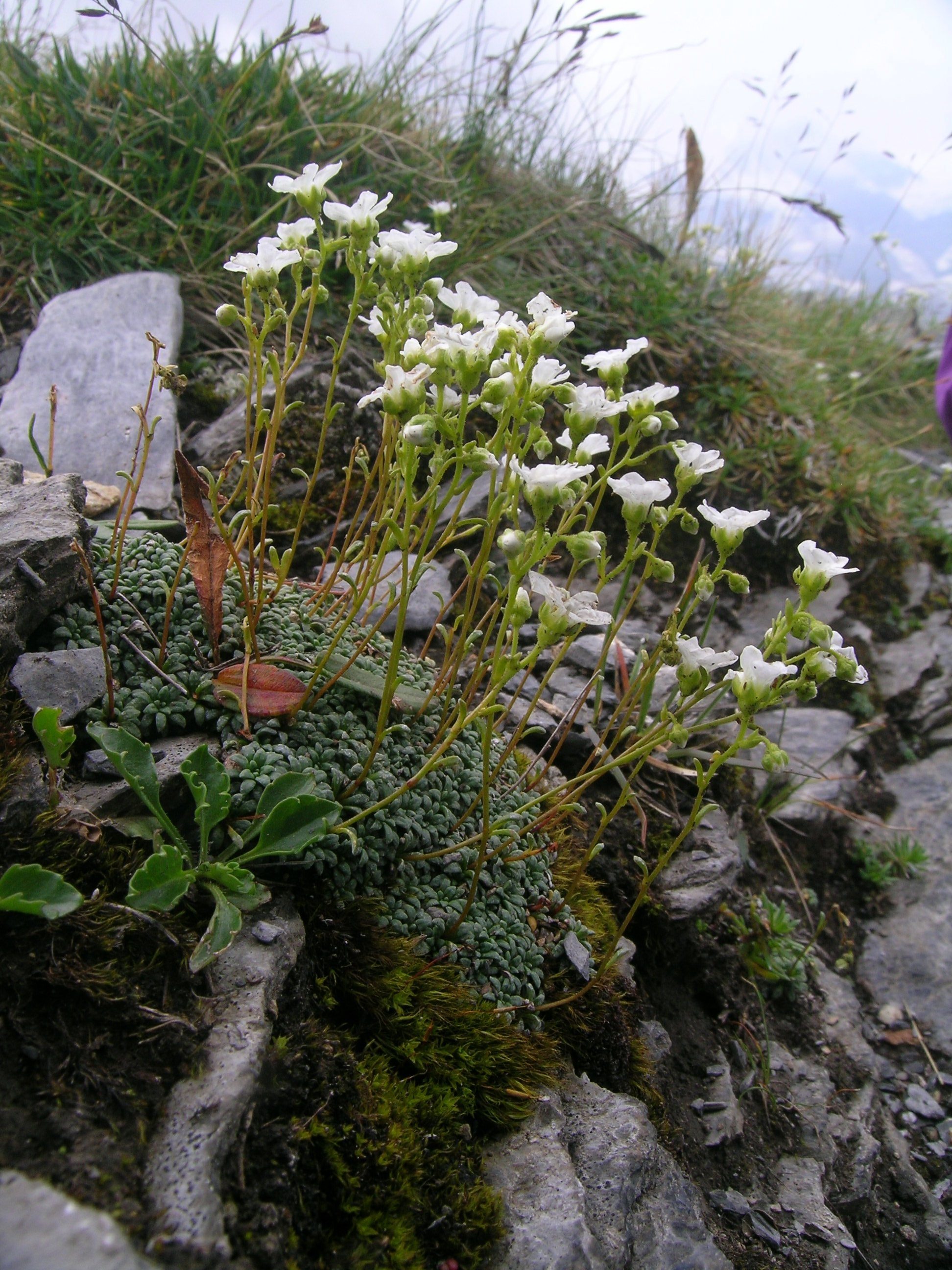 Saxifraga caesia, Rottal, oberhalb "Bäreflue", Schweiz (2250 m.a.s)